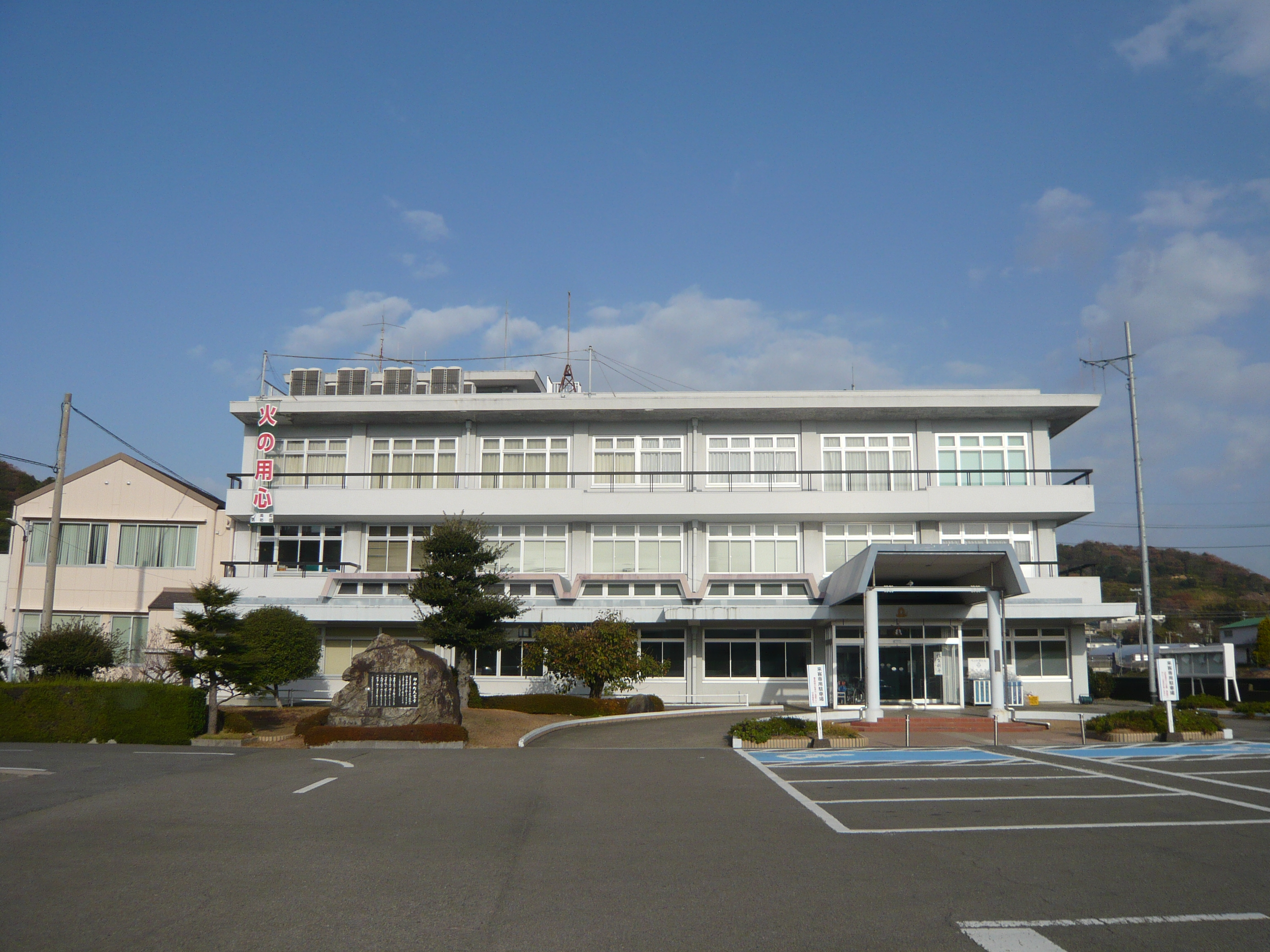 印南町役場